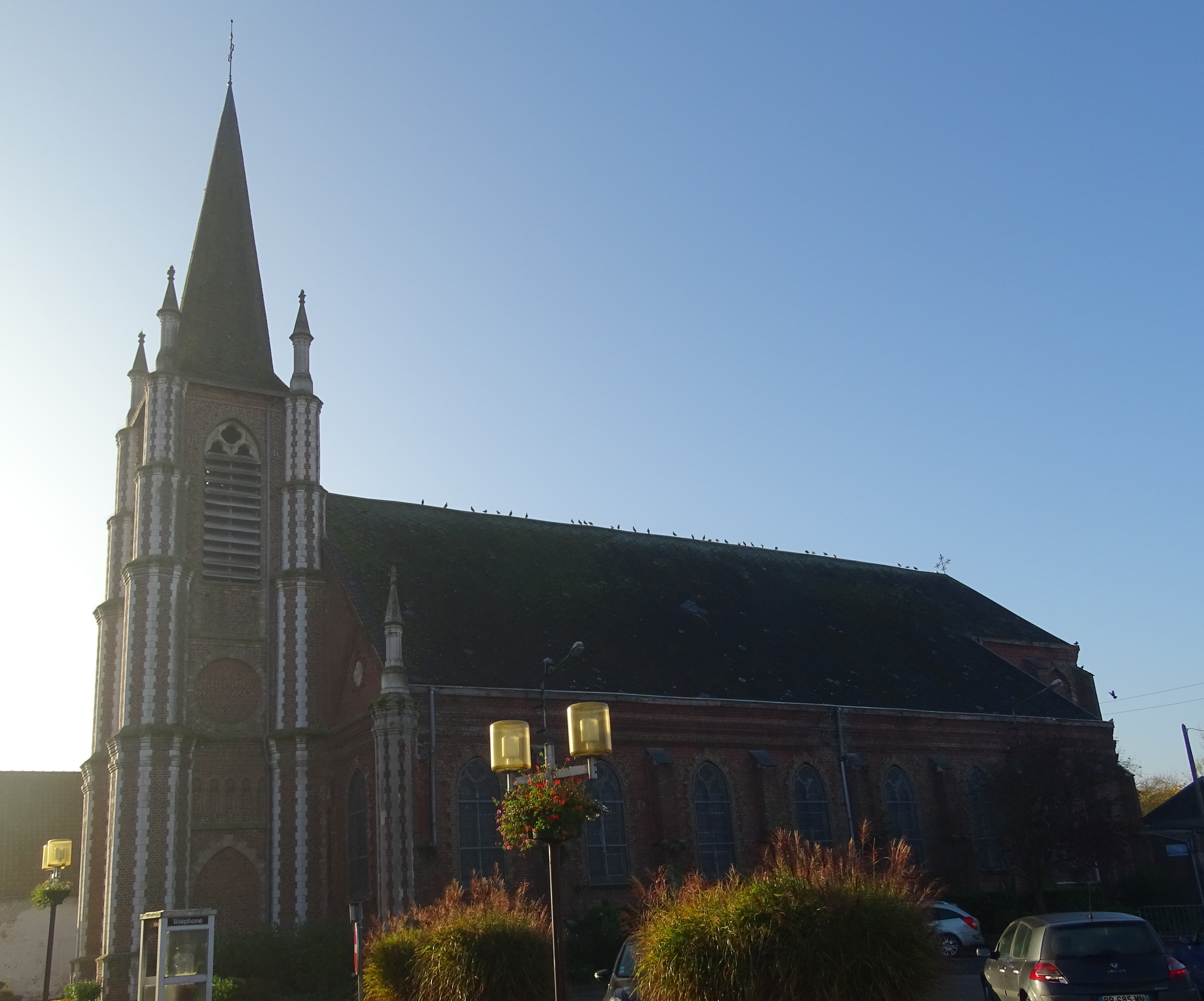 Église Saint-Sarre de Vred.